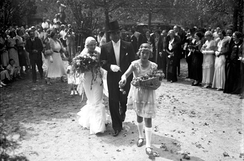 Die kirchliche Trauung des deutschen Ex-Boxweltmeisters Max Schmeling mit der Filmschauspielerin Anny Ondra in Bad Saarow! Das glückliche Brautpaar Ex-Boxweltmeister Max Schmeling und Filmschauspielerin Anny Ondra, verlassen mit Blumen überladen, die Kirche in Bad Saarow nach Trauung.